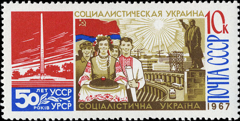 Памятник В. И. Ленину у Днепрогэса. Обелиск в парке Славы (1957, арх. А. Милецкий и др.) в Киеве. Художник: Ю. Ряховский. Марка СССР, номинал - 10коп.